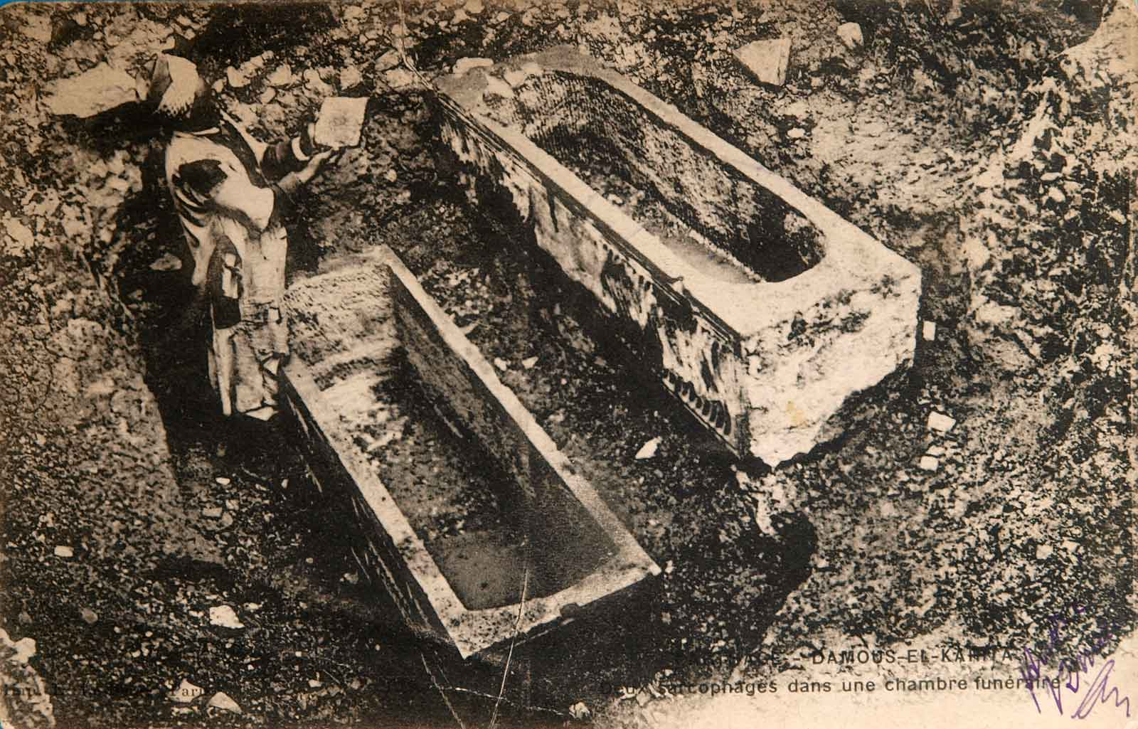 sarcophages lors de fouilles de la basilique de Damous el Karita